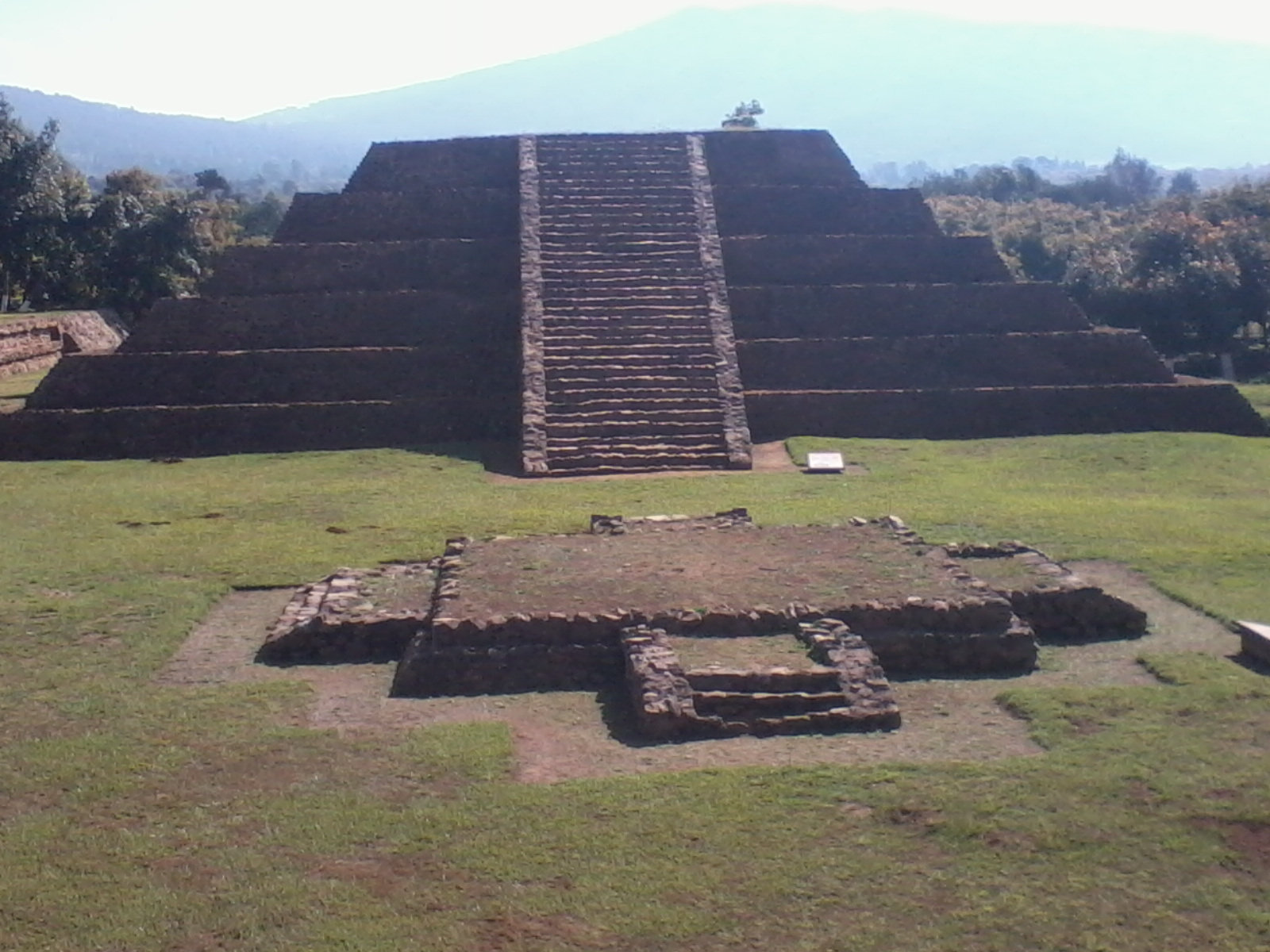 Zona Arqueologica de Tingambato — en Michoacán.